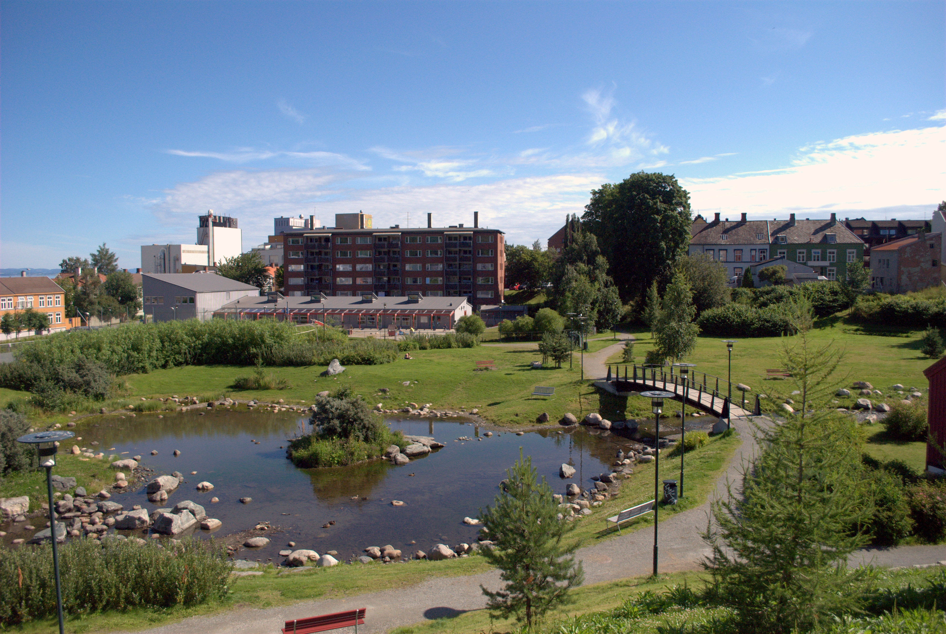 Iladalen park ved Ila / Ilsvika i Trondheim.